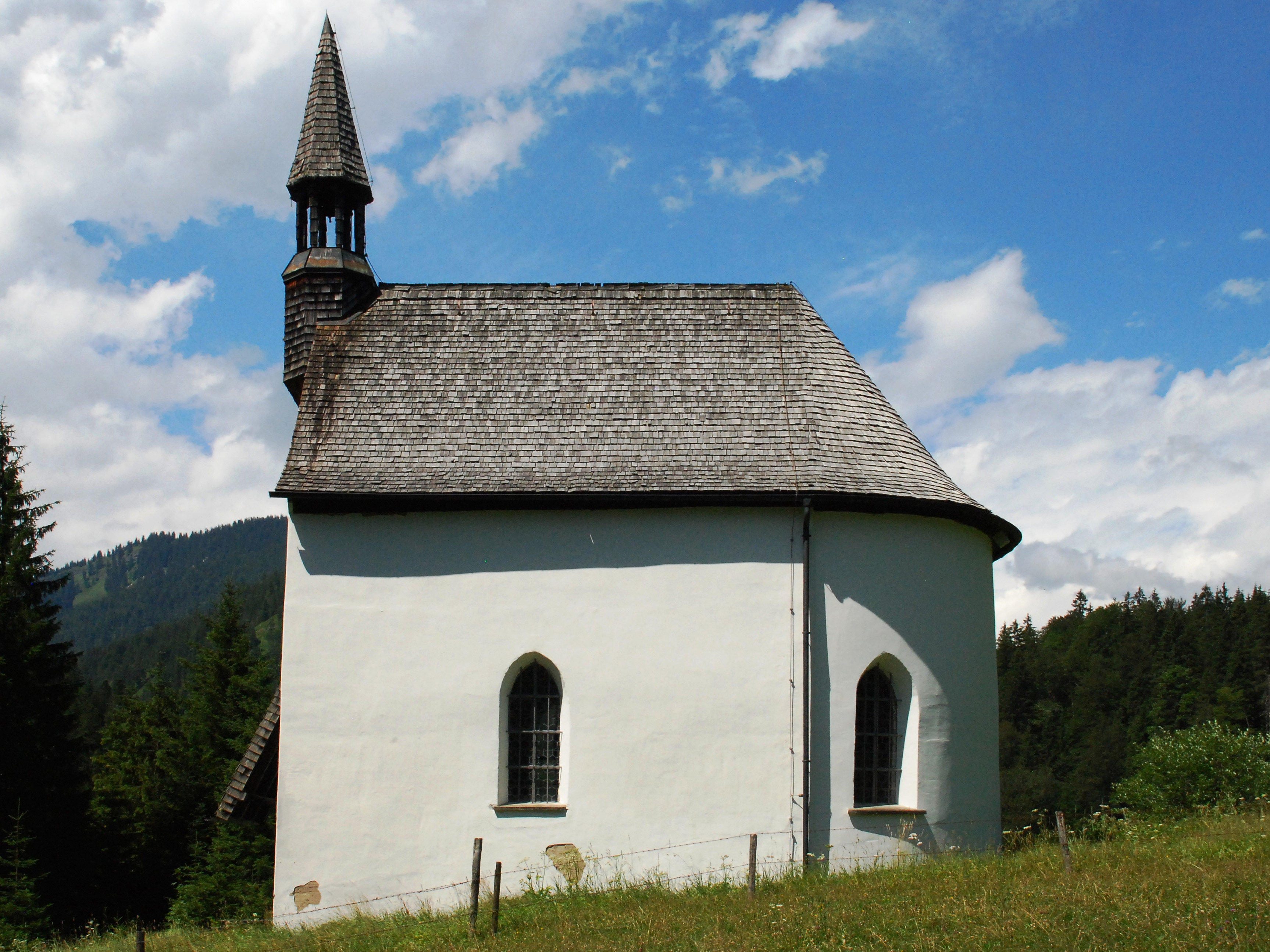 Kapelle Maria Hilf in Valepp, Markt Schliersee, Landkreis Miesbach, Regierungsbezirk Oberbayern, Bayern. Als Baudenkmal in der Bayerischen Denkmalliste aufgeführt